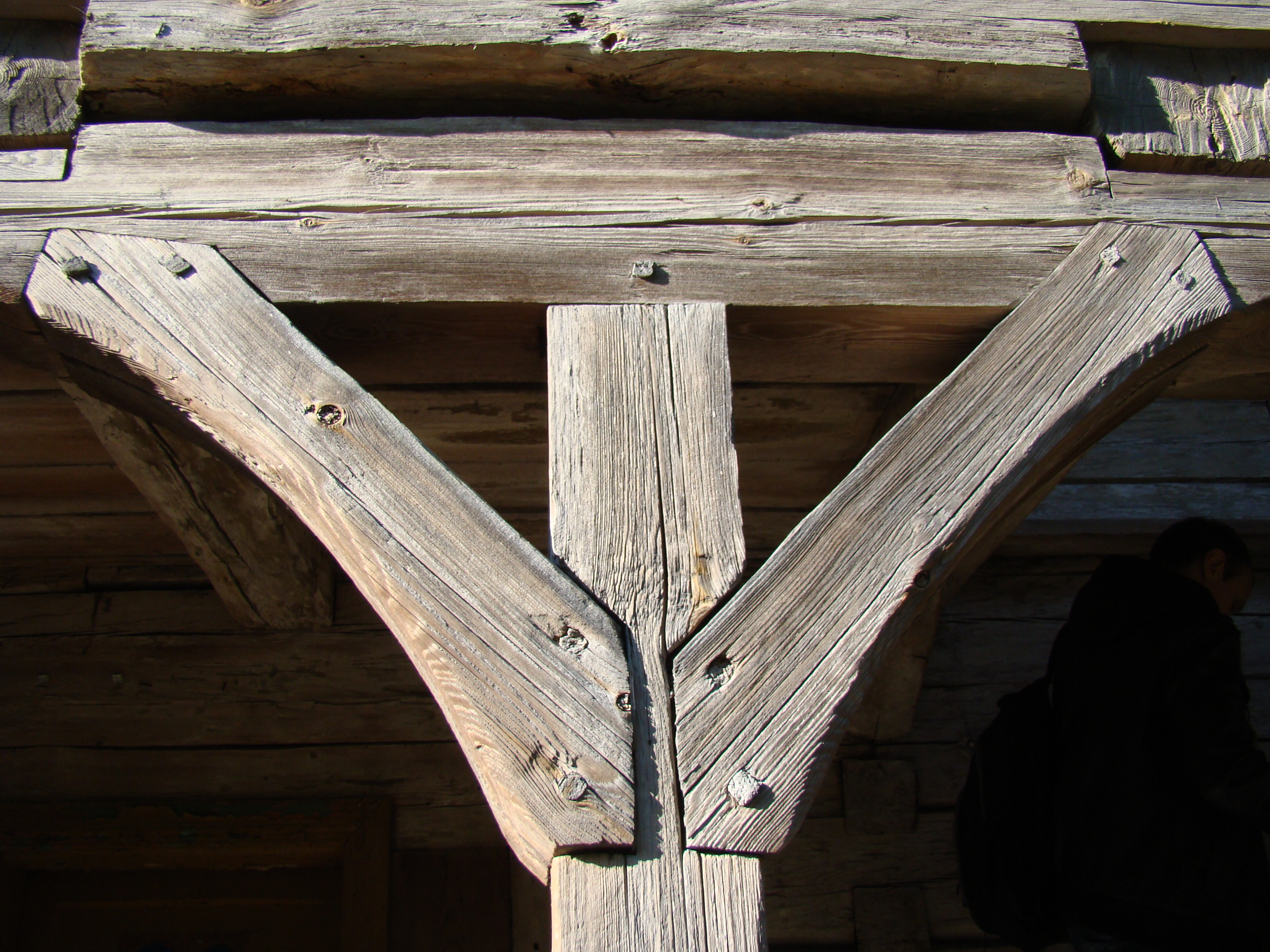 Беларуская (тарашкевіца): Ансамбль былога кляштара брыгітак:касьцёлжылы корпуслямусагароджа з брамай. г. Горадня This is a photo of Belarusian heritage monument. Reference number: 412Г000017 ( WLM)